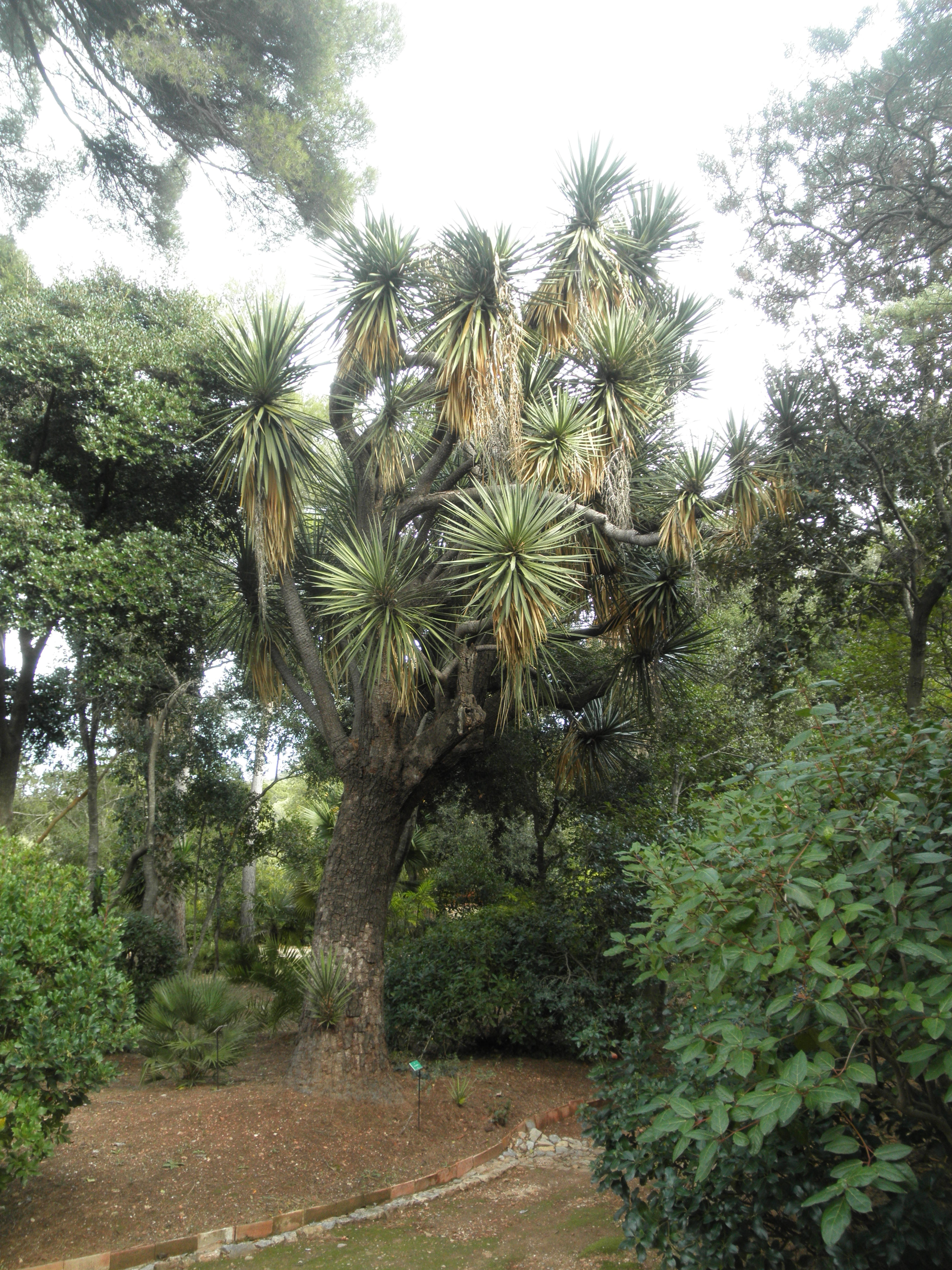 Yucca filifera du Plantier de Costebelle qui a fleuri en 1876 pour la première fois. C'est ce yucca qui est à l'origine de la description du taxon d'origine par J.B. Chabaud en 1876 (Rev. Hort. 48:1876).